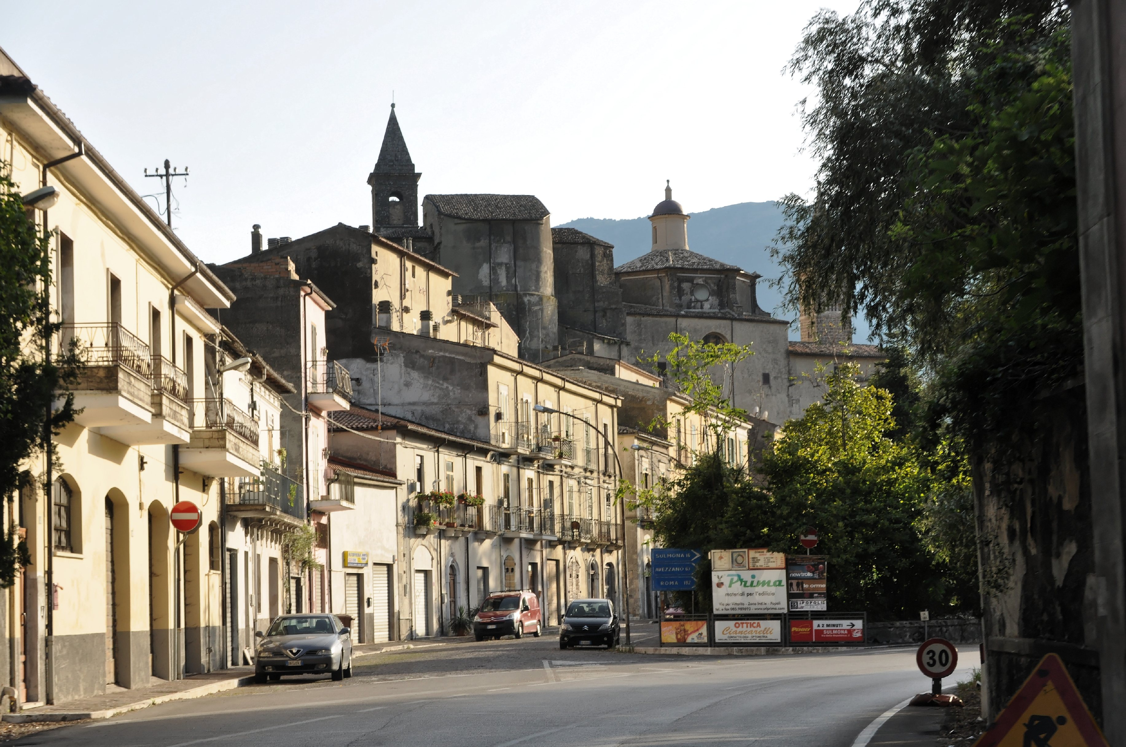 Popoli 2013